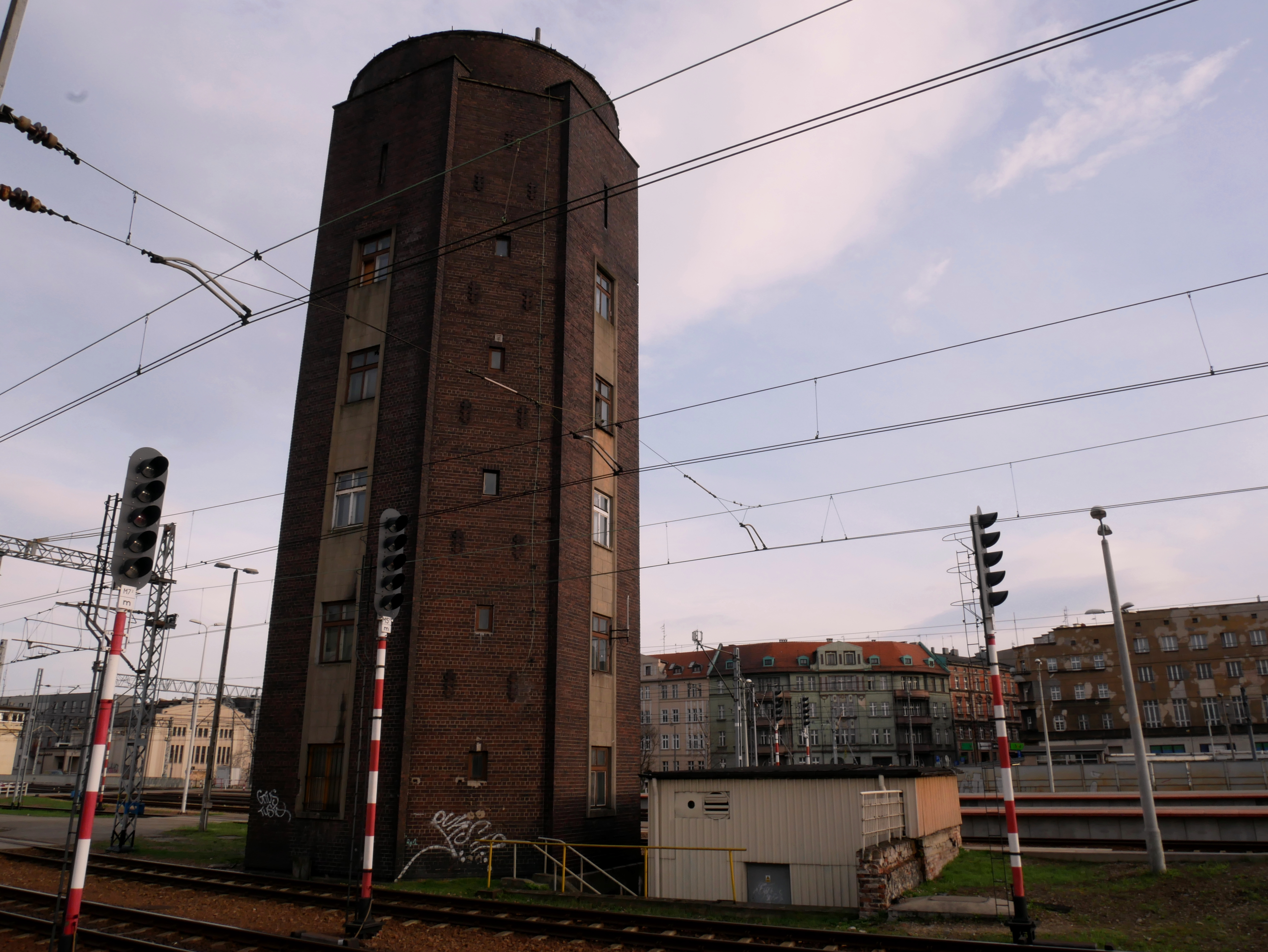 Wieża ciśnień na Dworcu w Katowicach